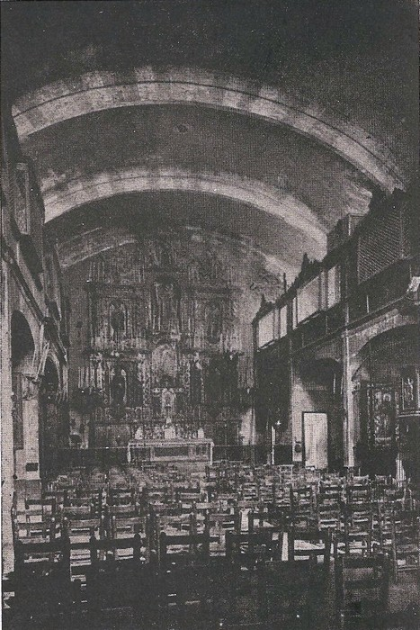 Fotografia de l'antiga església de Santa Clara, instal·lada en 1715 al Saló del Tinell de Barcelona. Fotografia d'abans de 1936.